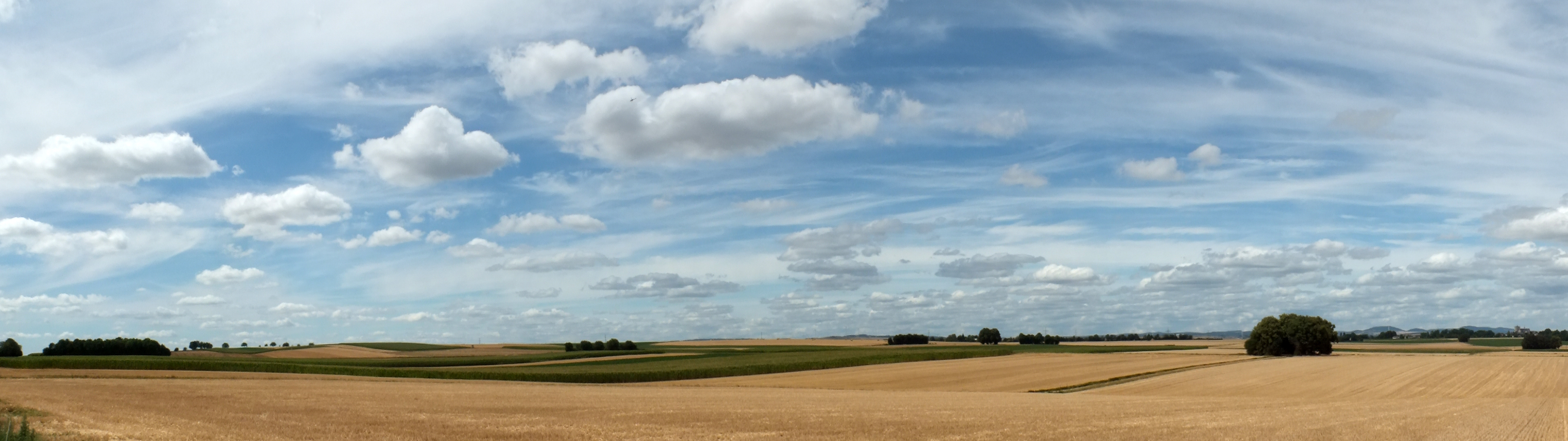 Auf der Hochebene des Maifelds wird überwiegend Getreide angebaut